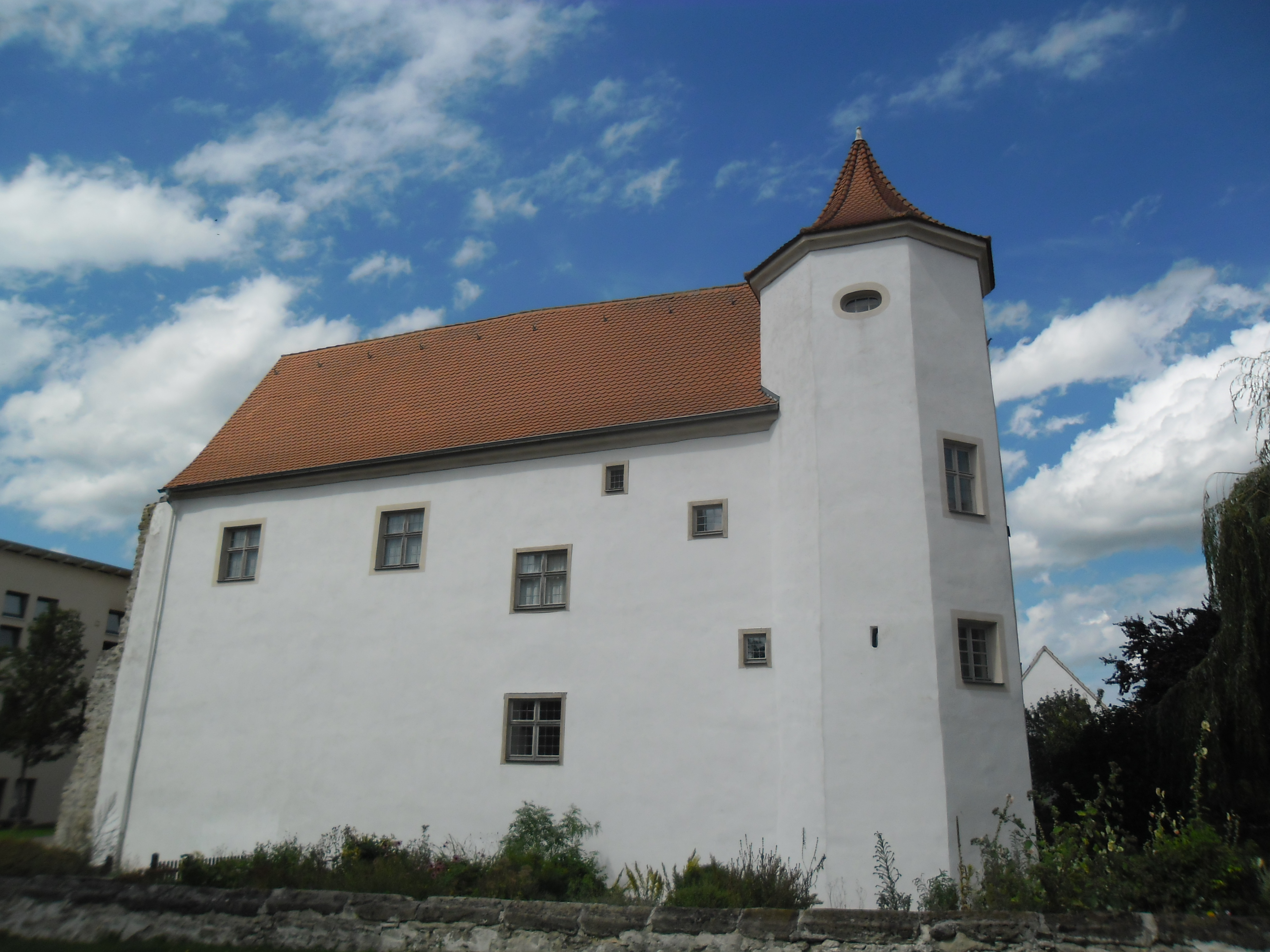 Südseite des Wasserschlosses Cronheim